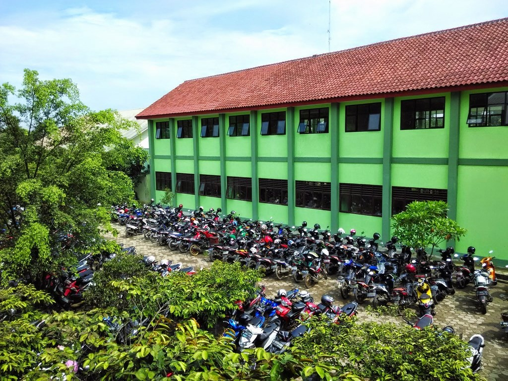 Gedung SMKN 2 Bekasi